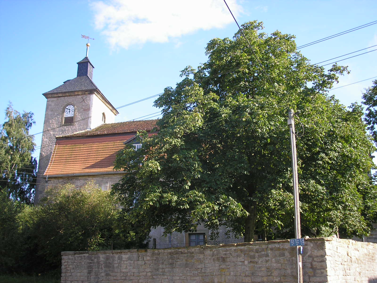 Die Kirche von Töttelstädt bei Erfurt.